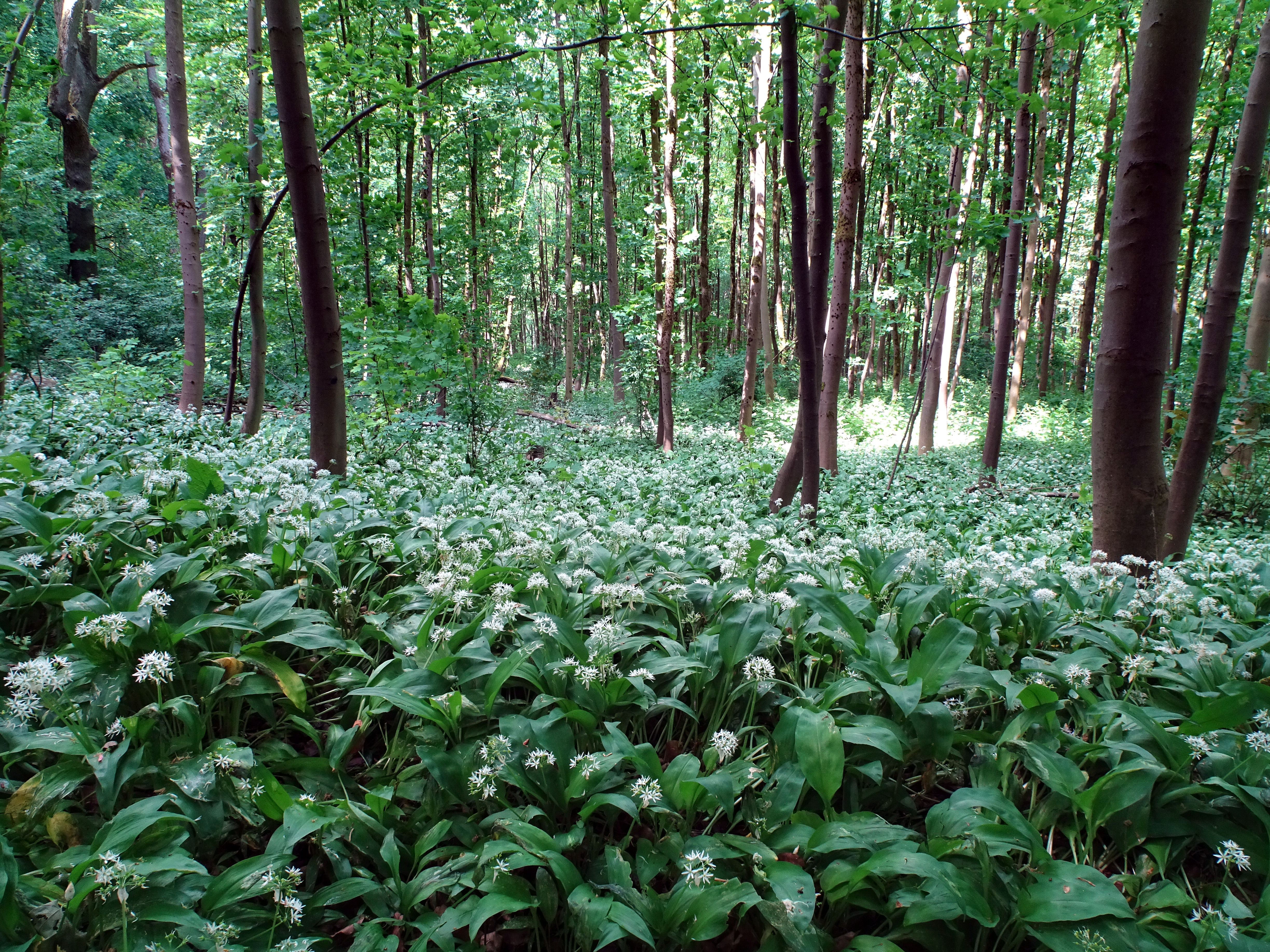 Bärlauchblüte im Kalkbuchenwald des Naturwaldreservats um die Ruine der Burg Reichenbach. (Das Naturwaldreservat ist Teil des Naturschutzgebiets.) Das Naturschutzgebiet "Reichenbacher Kalkberge" besteht aus zwei Teilgebieten. Der größere Teil liegt nordwestlich von Reichenbach mit den Bergkuppen "Ruine Reichenbach" und "Großer Rohrberg" und der kleinere Teil mit dem "Kindelberg" befindet sich nordöstlich von Reichenbach. Aufgrund seiner Artenvielfalt ist das Naturschutzgebiet Teil des europäischen Schutzgebietsnetzes "Natura 2000" geworden. Es wurde Bestandteil des gleichnamigen Fauna-Flora-Habitat-Gebietes mit der Nr. 4824-301. Das Gebiet gehört zum Geo-Naturpark Frau-Holle-Land.